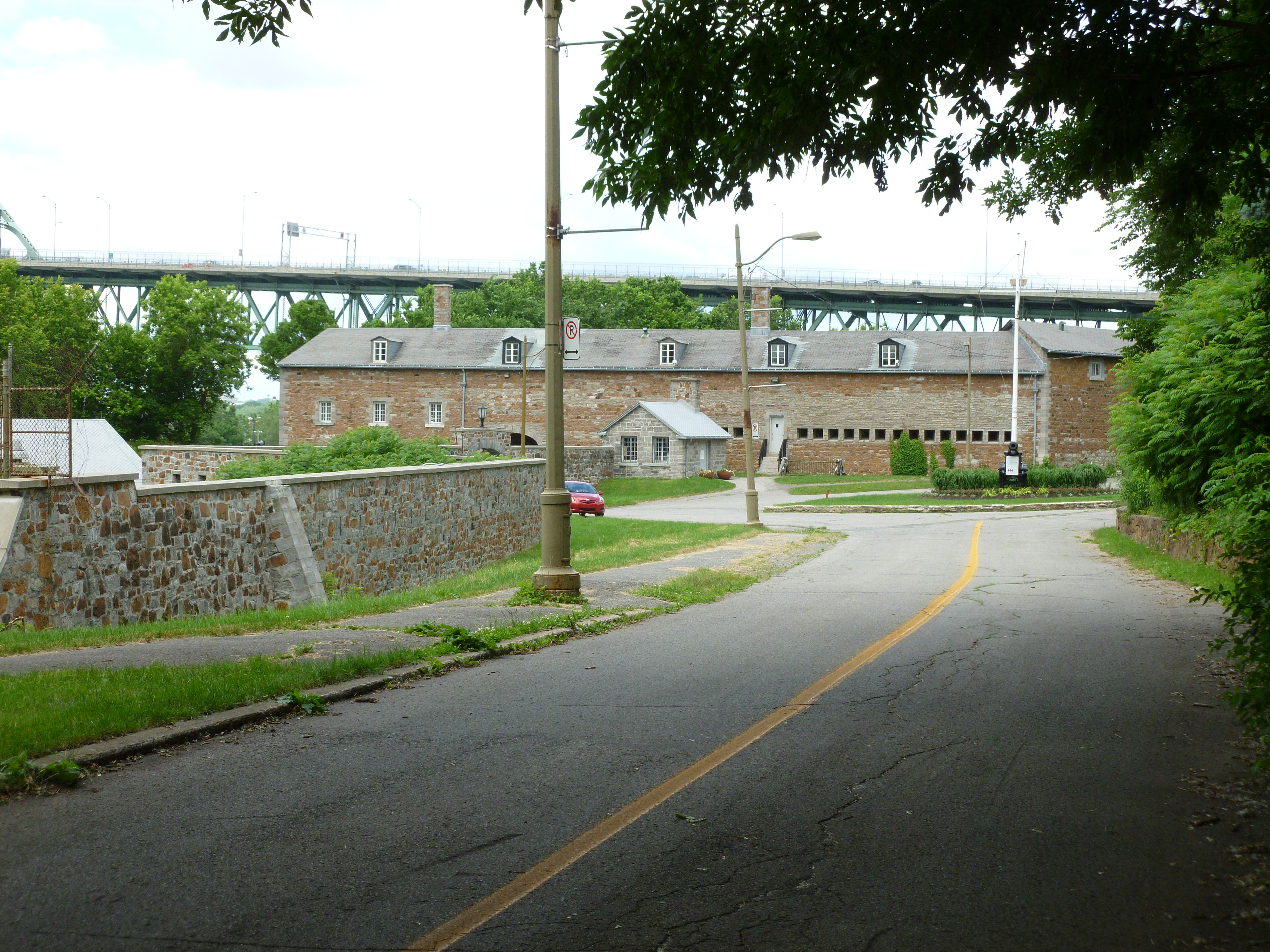 Entrée du Musée Stewart, au Parc Jean-Drapeau à Montréal